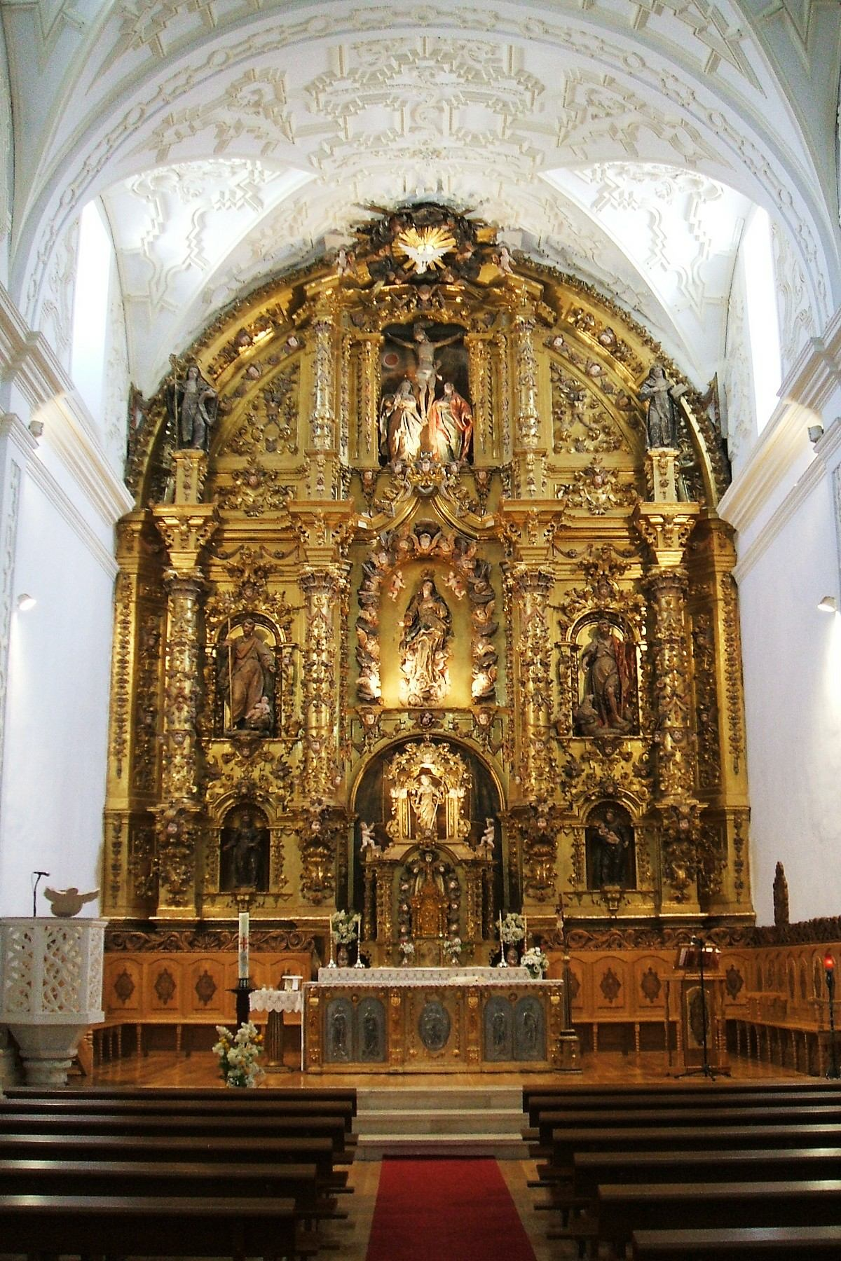 Cabecera, altar y retablo mayor de la iglesia del Real Monasterio de Nuestra Señora de la Consolación (MM Clarisas Franciscanas), Calabazanos, Palencia, Castilla y León, España